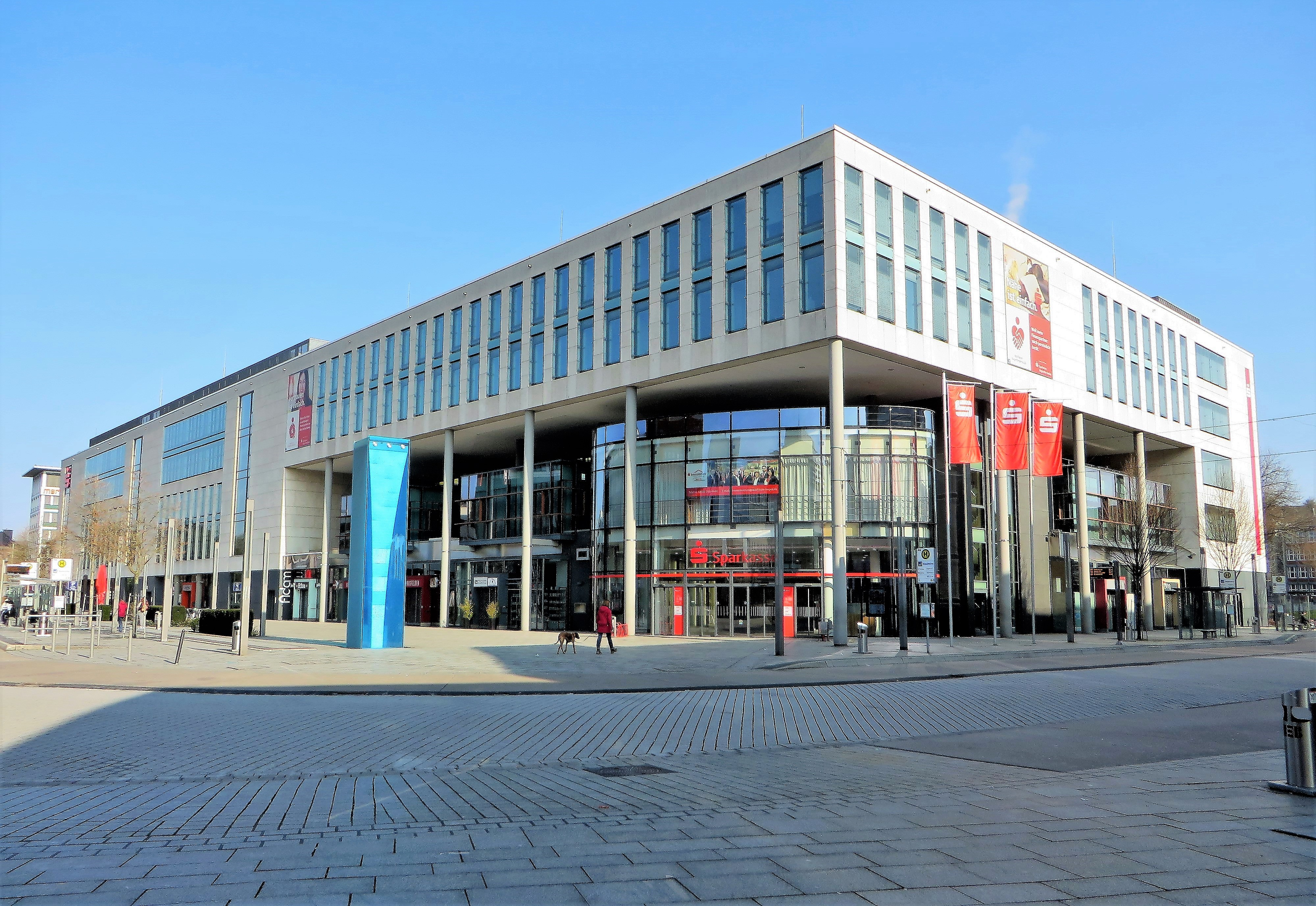 Sparkassen-Karree in Hagen, Badstraße Ecke Körnerstraße. Gebäude mit Stadtsparkasse, Geschäften und Büros. Baubeginn war 2004.